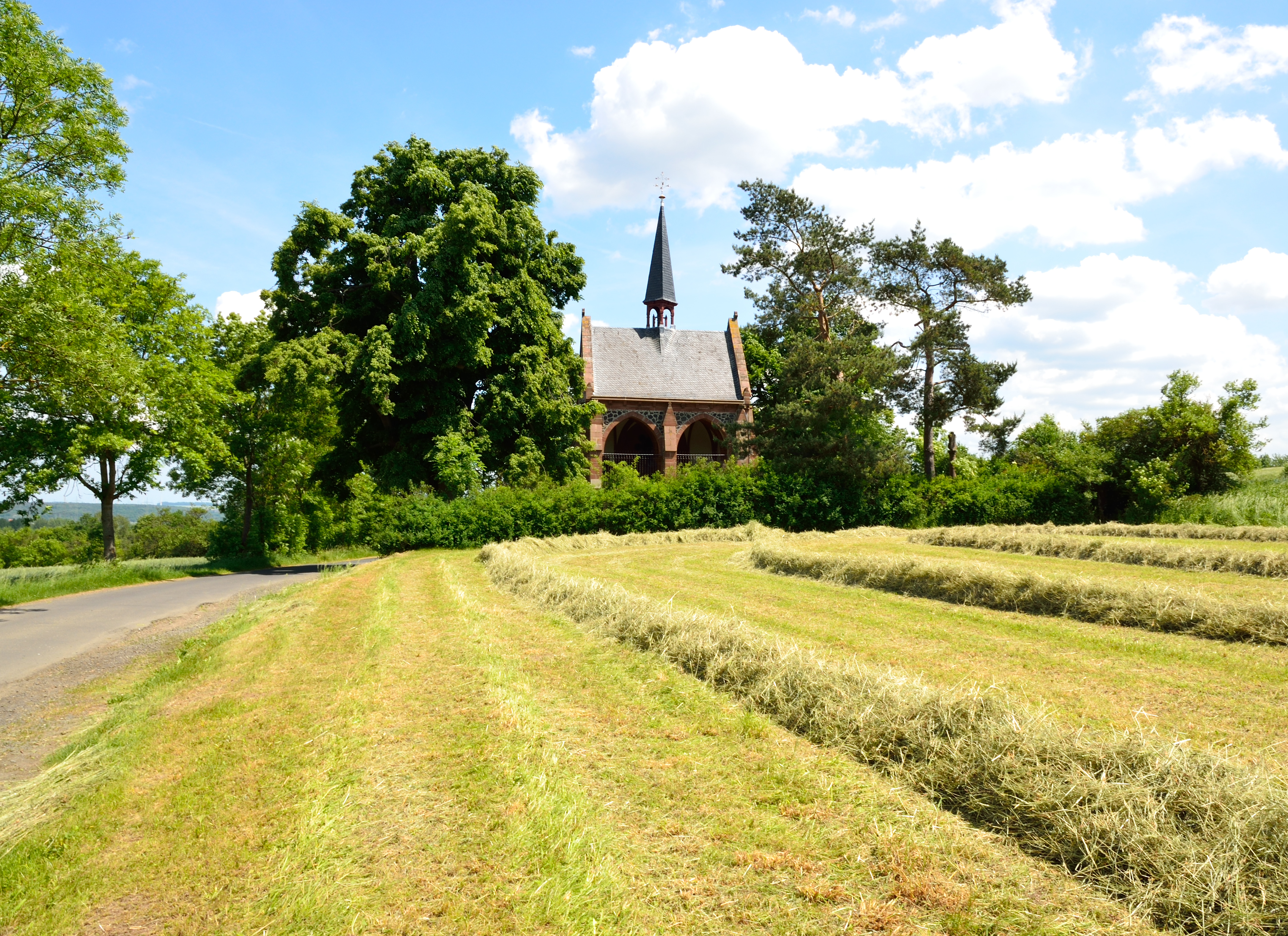 Die Magdalenen-Kapelle in Amöneburg